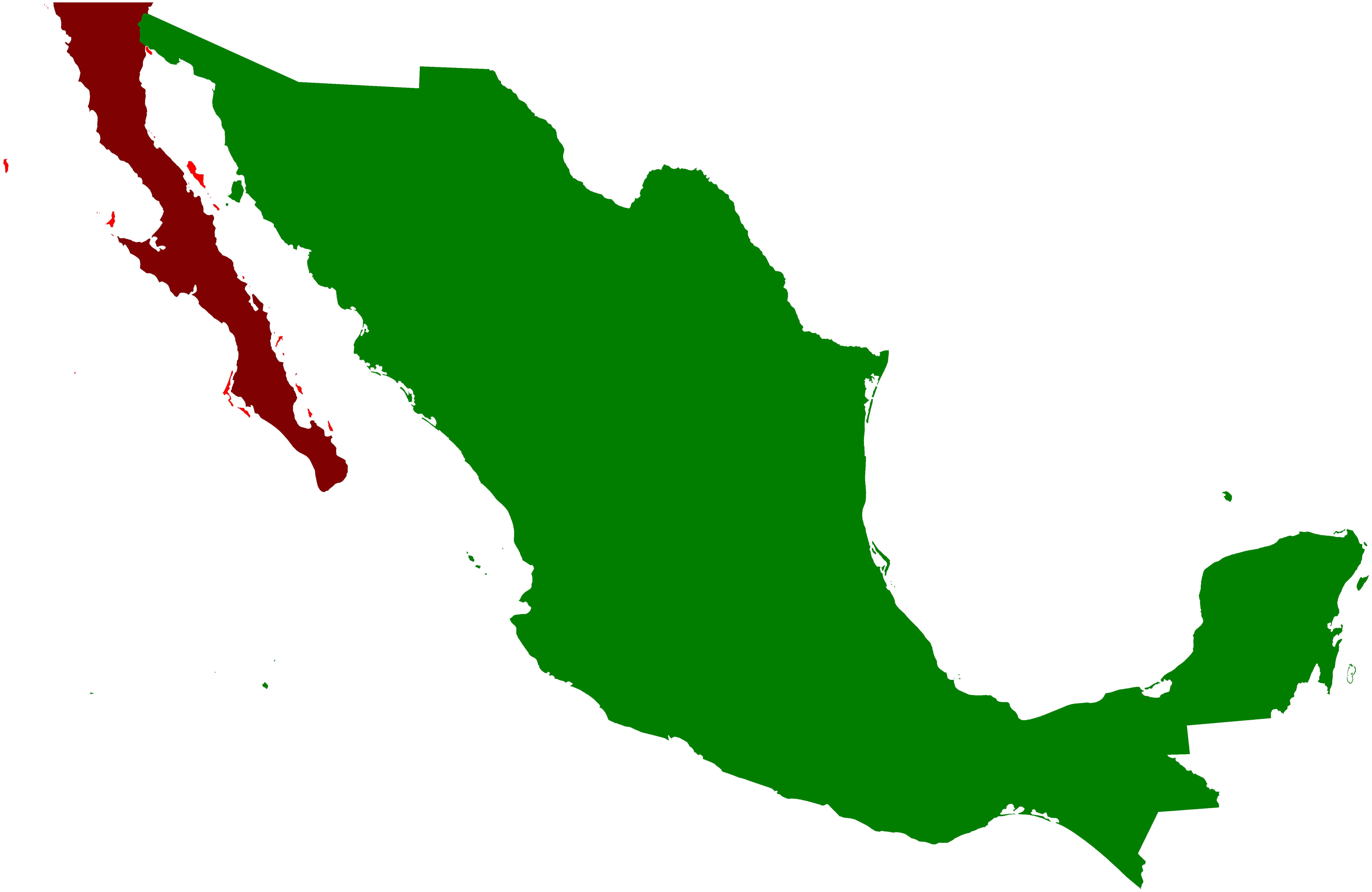 GFDL, Zelfgemaakt voor Wikipedia. Deze afbeelding is speciaal gemaakt voor Wikipedia. Het mag van de maker voor alle Wikipedia's en aanverwante projecten gebruikt worden in alle talen. Het rode gedeelte geeft eigenlijk meer de twee deelstaten van dit gebied weer als wat eigenlijk het schiereiland is.